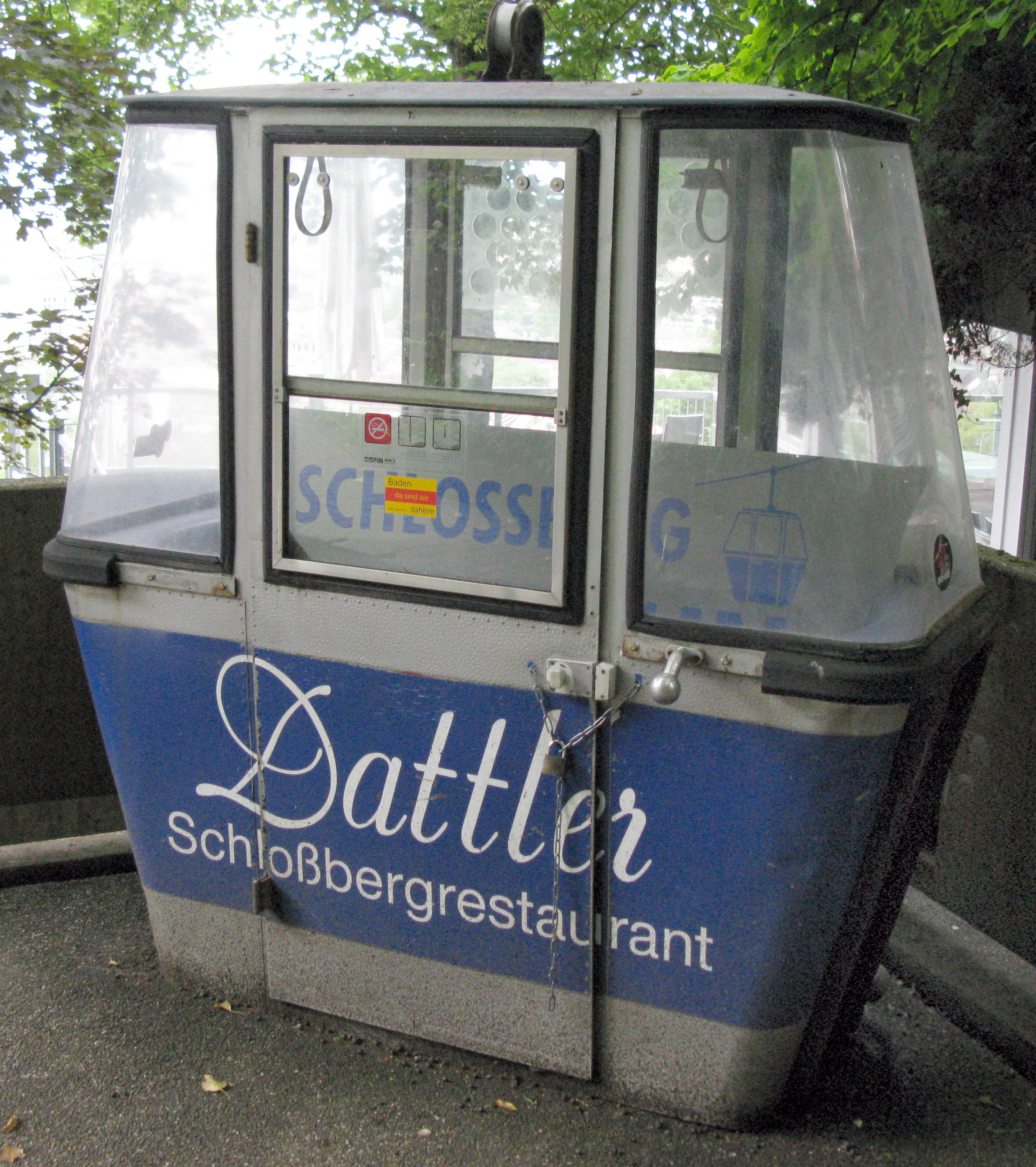 Kabine der früheren Schlossbergseilbahn in Freiburg